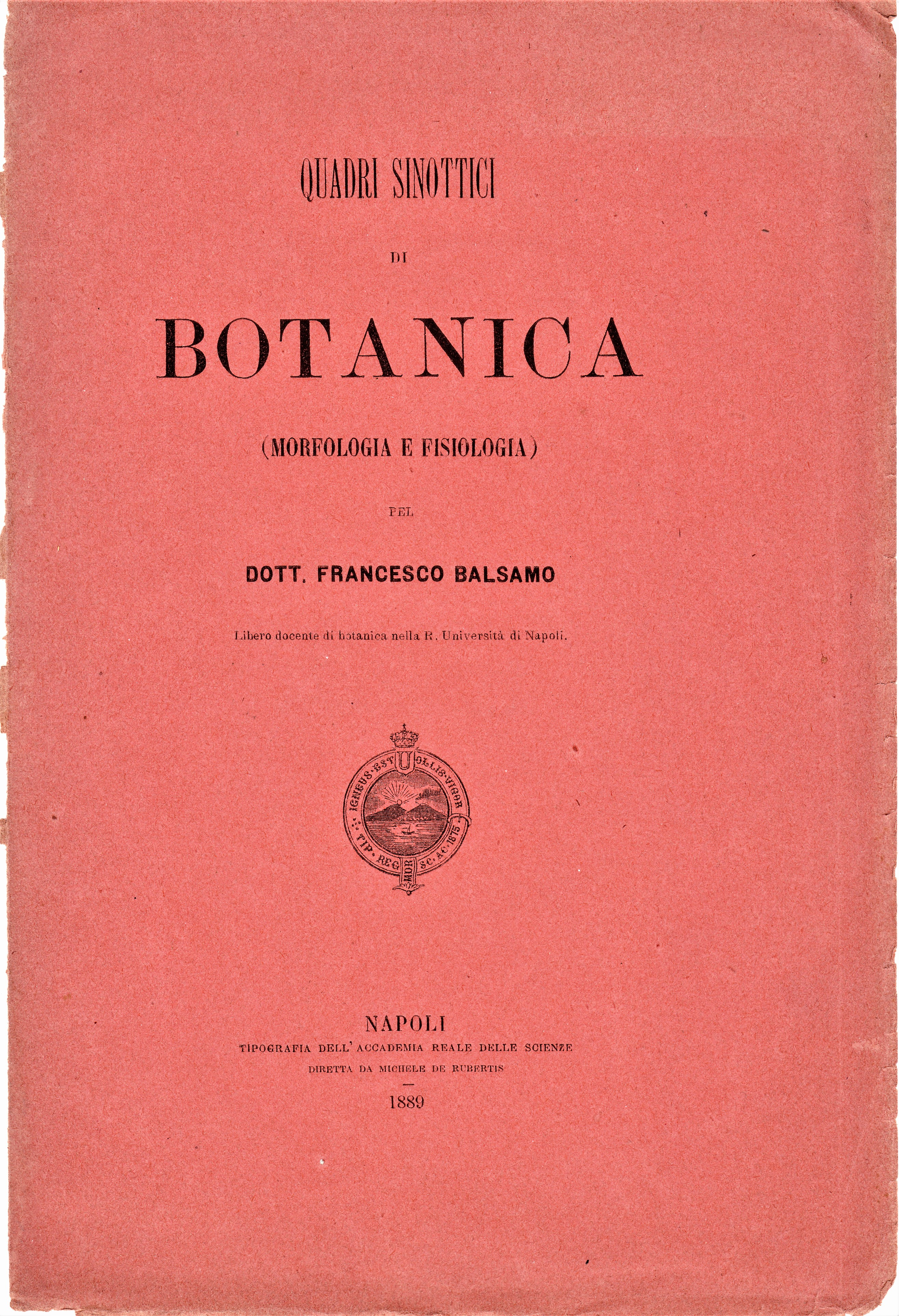 Copertina di: Quadri sinottici di Botanica (Morfologia e Fisiologia) (1889) di Francesco Balsamo.